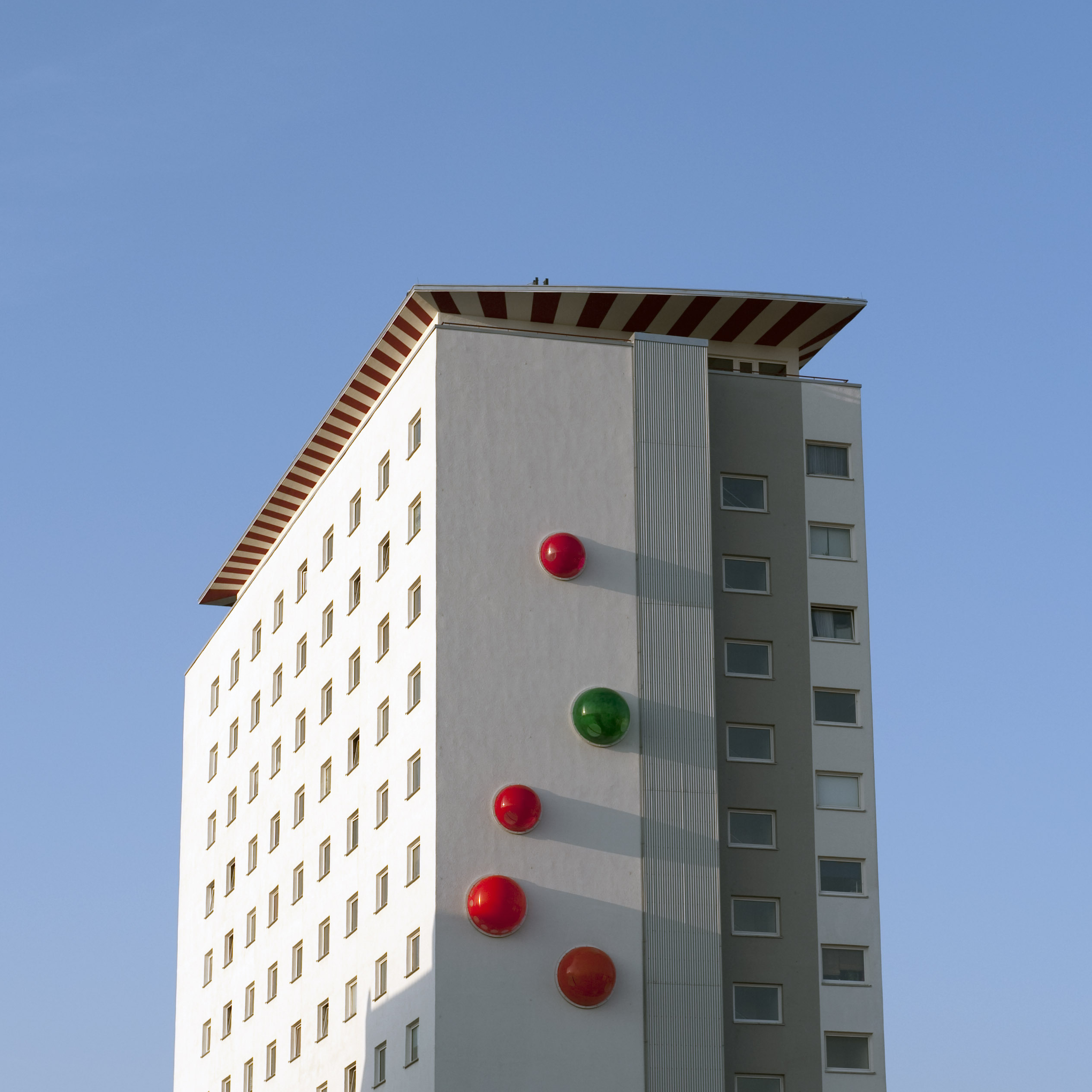 Hochhaus in Bremerhaven with art